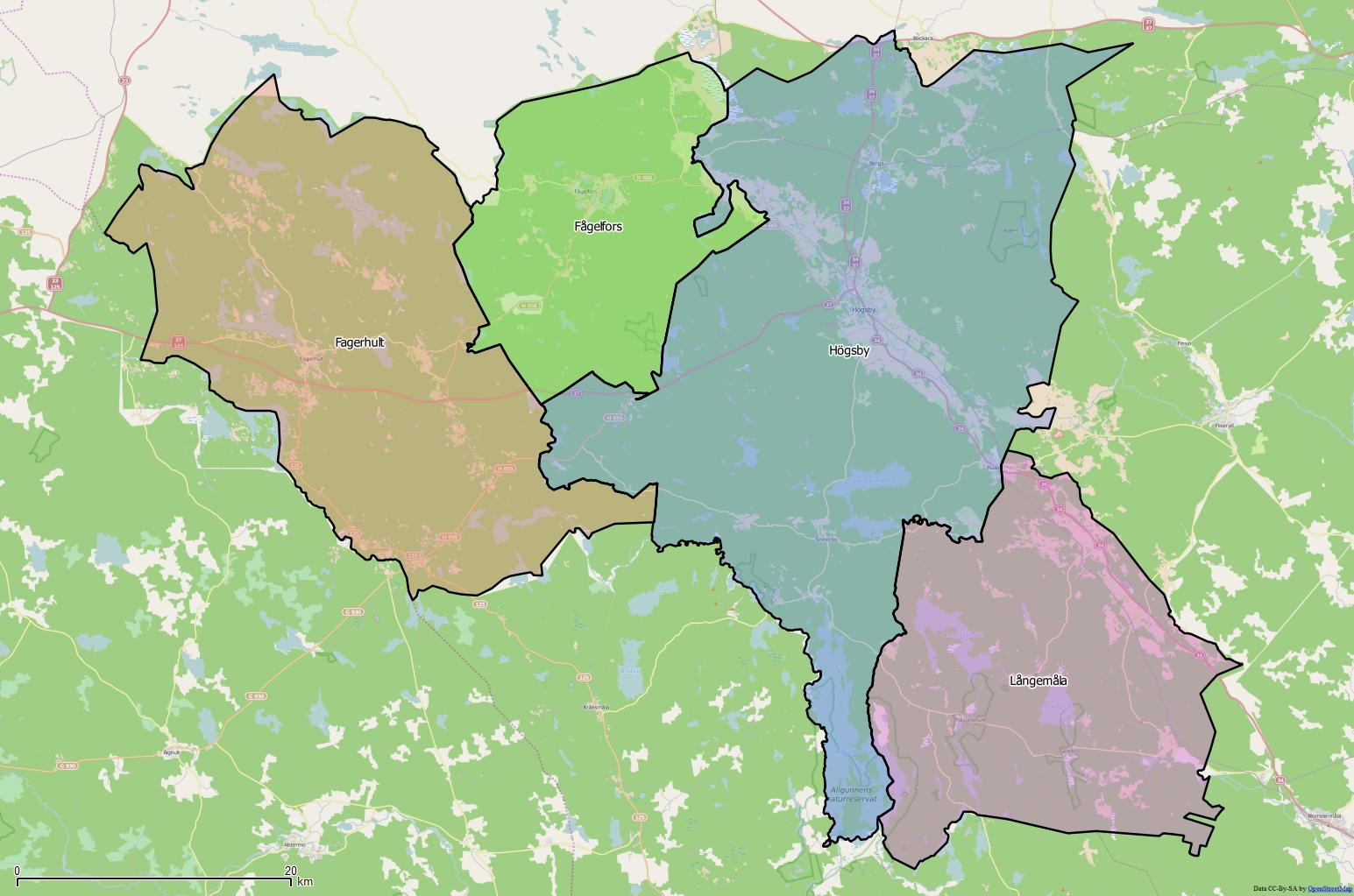 Distriktsindelningen i Högsby kommun World file: 64.0675461983393717 0 0 -64.0675461983393717 1720918.5830720248632133 7816580.90566893387585878